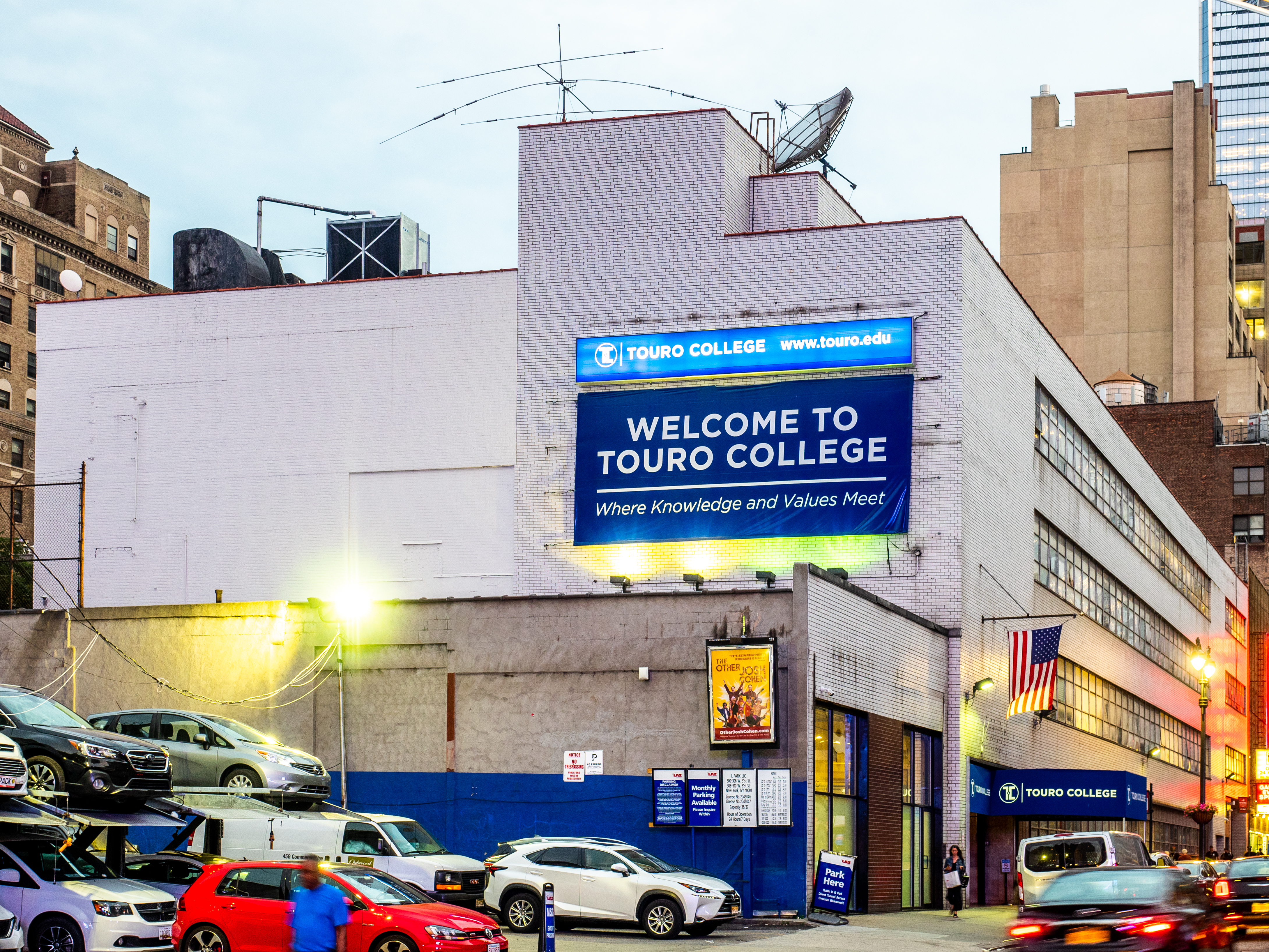 Hells Kitchen, NYC